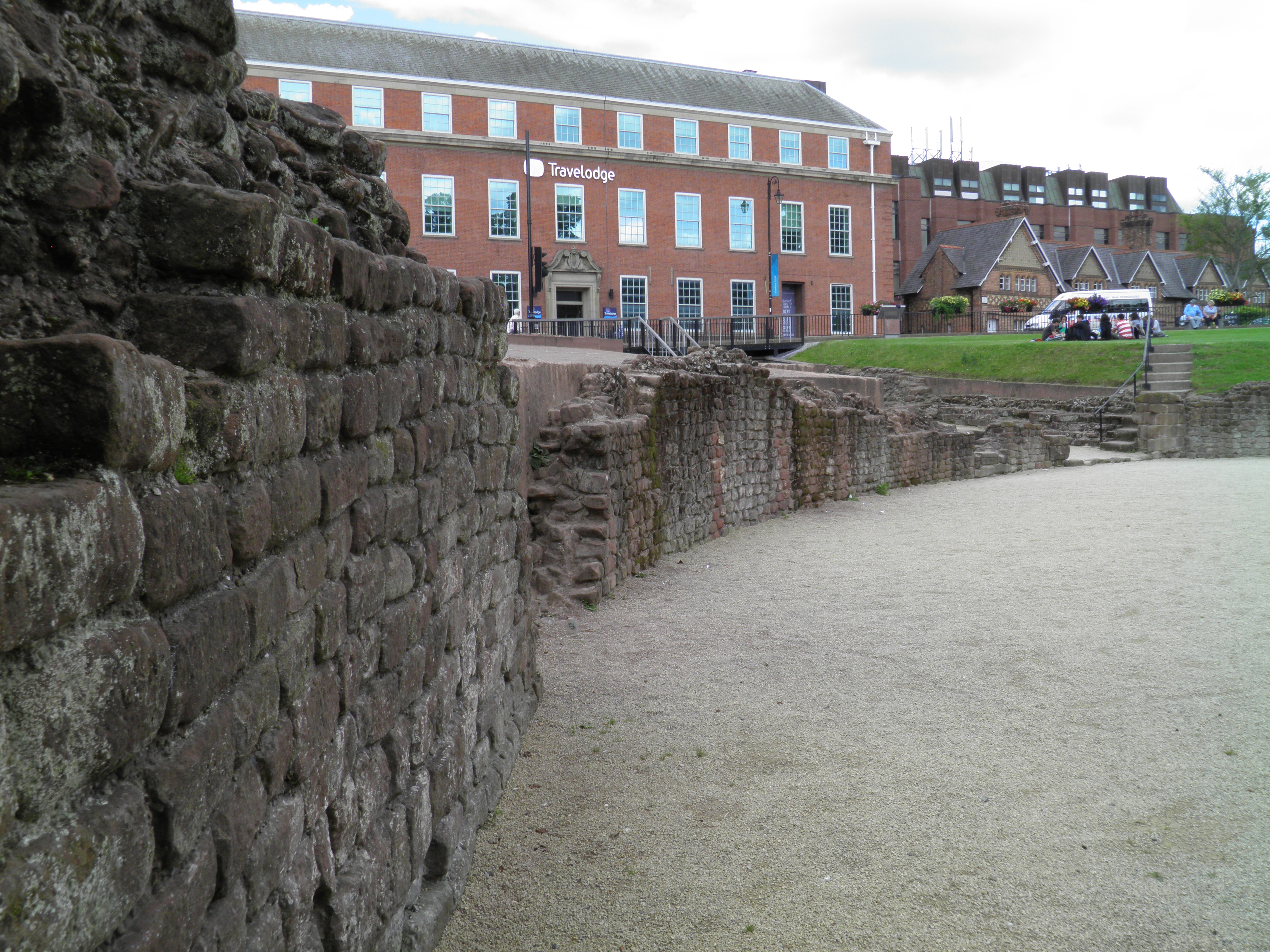 Deva Victrix (Chester, UK)